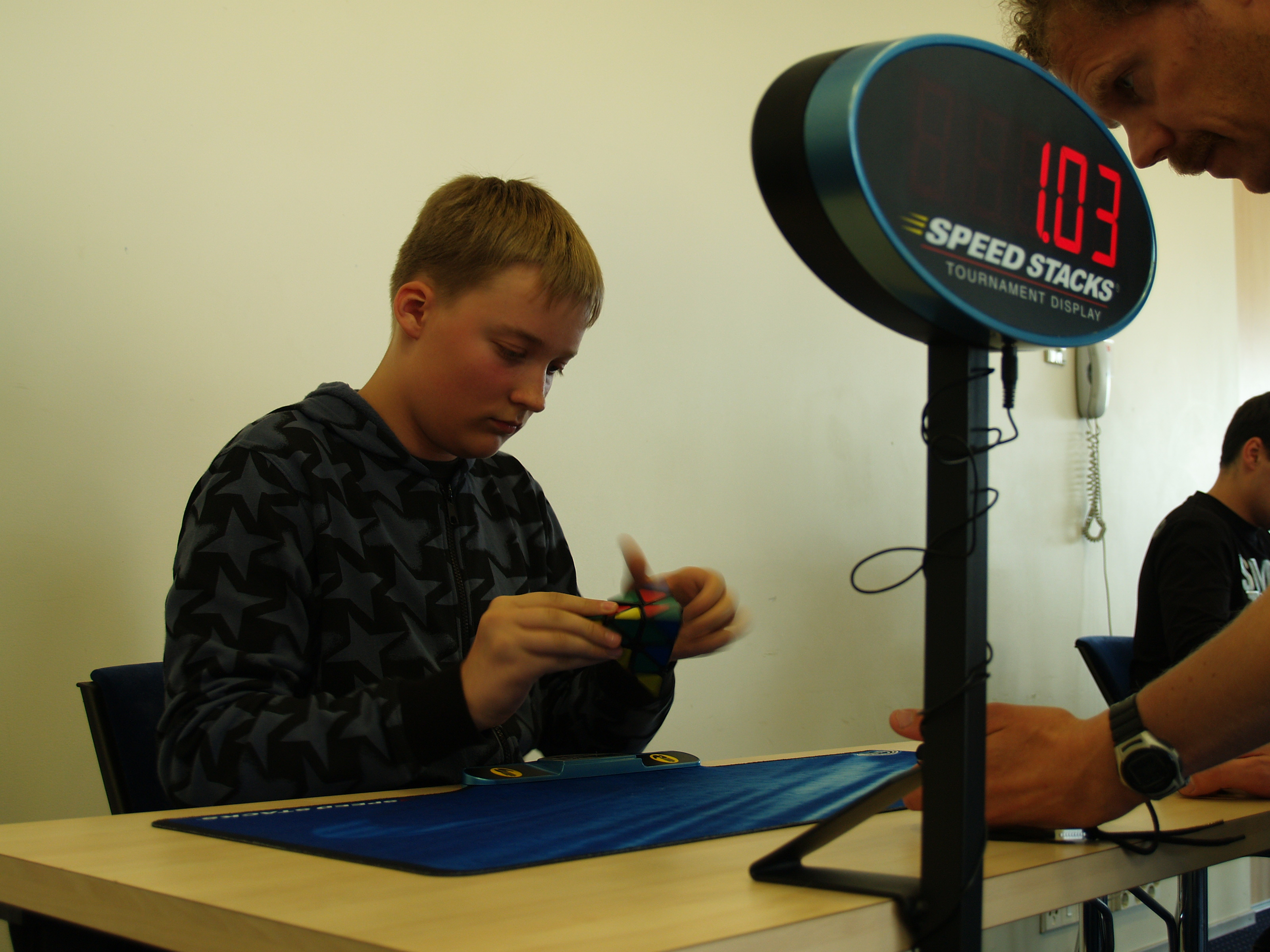 Püraminksi lahendamine Estonian Open 2011 võistlusel.